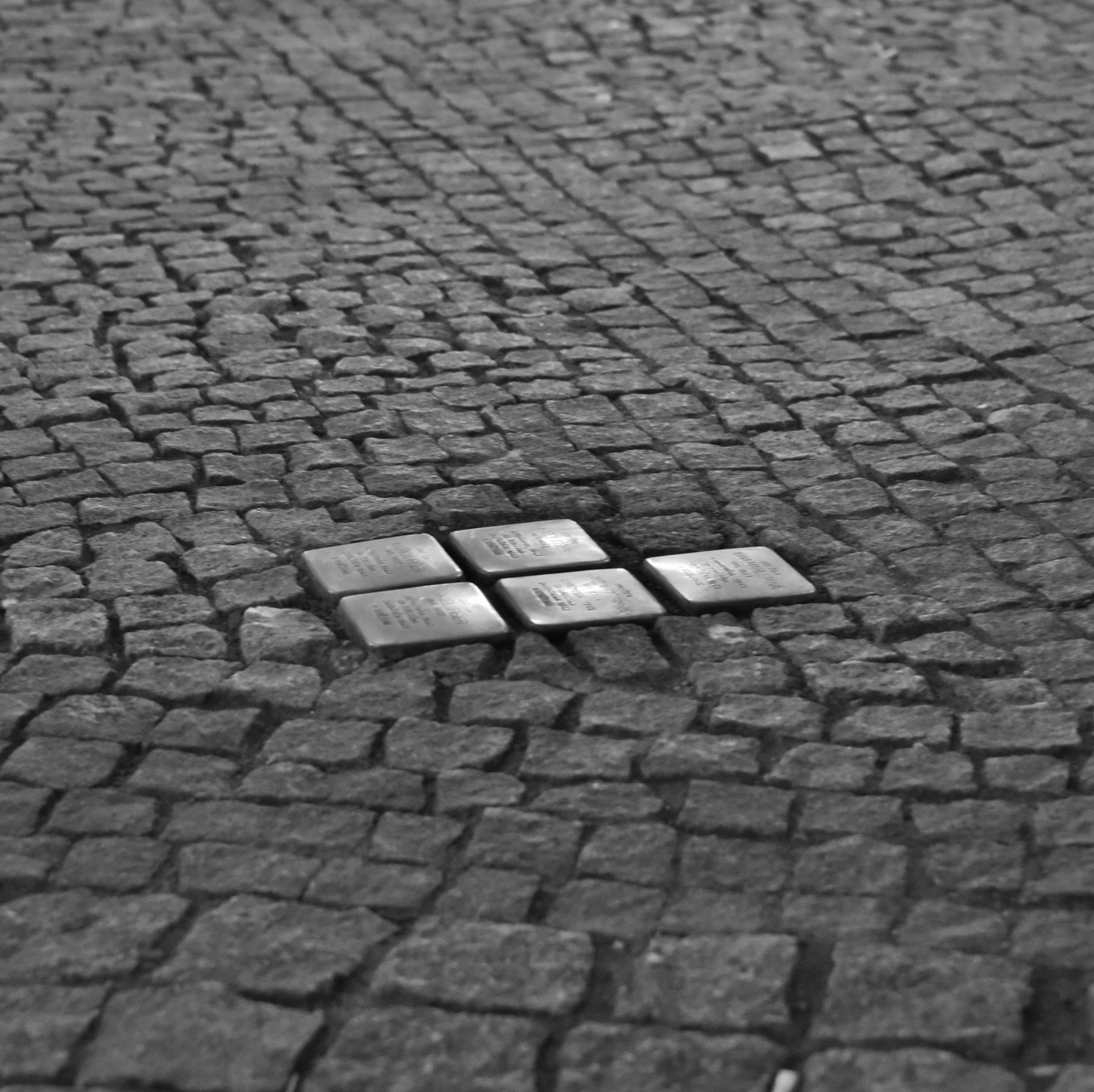 Stolpersteine für Familie Fiser